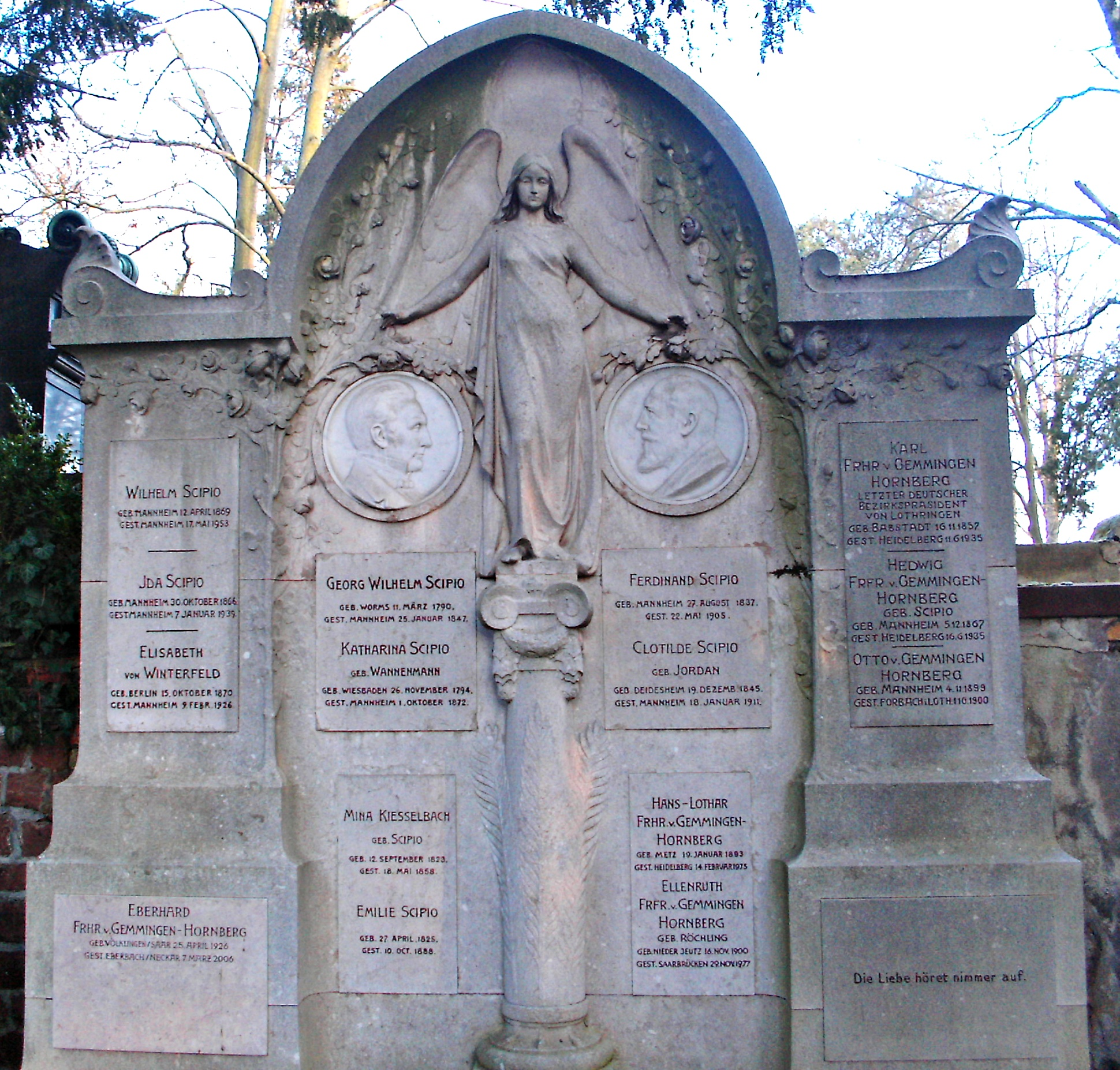 Ferdinand Scipio (1837-1905), Mannheimer Unternehmer, Familiengrab, Hauptfriedhof Mannheim